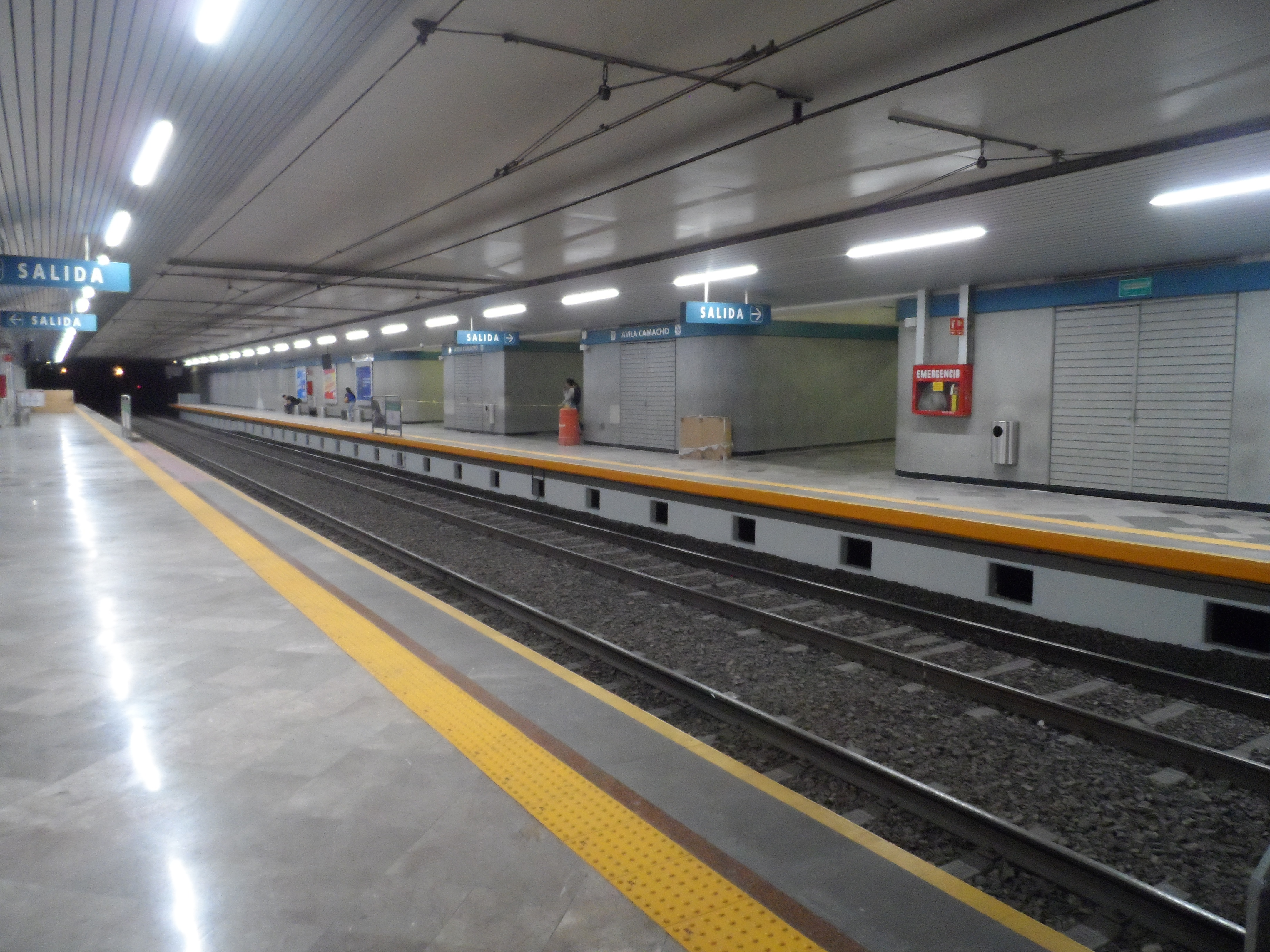 Andenes de la estación "Ávila Camacho" de la Línea 1 del Tren Ligero de Guadalajara.